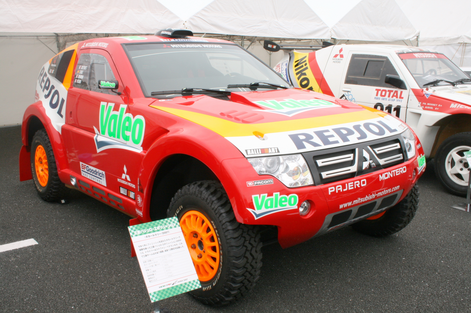 三菱・パジェロ